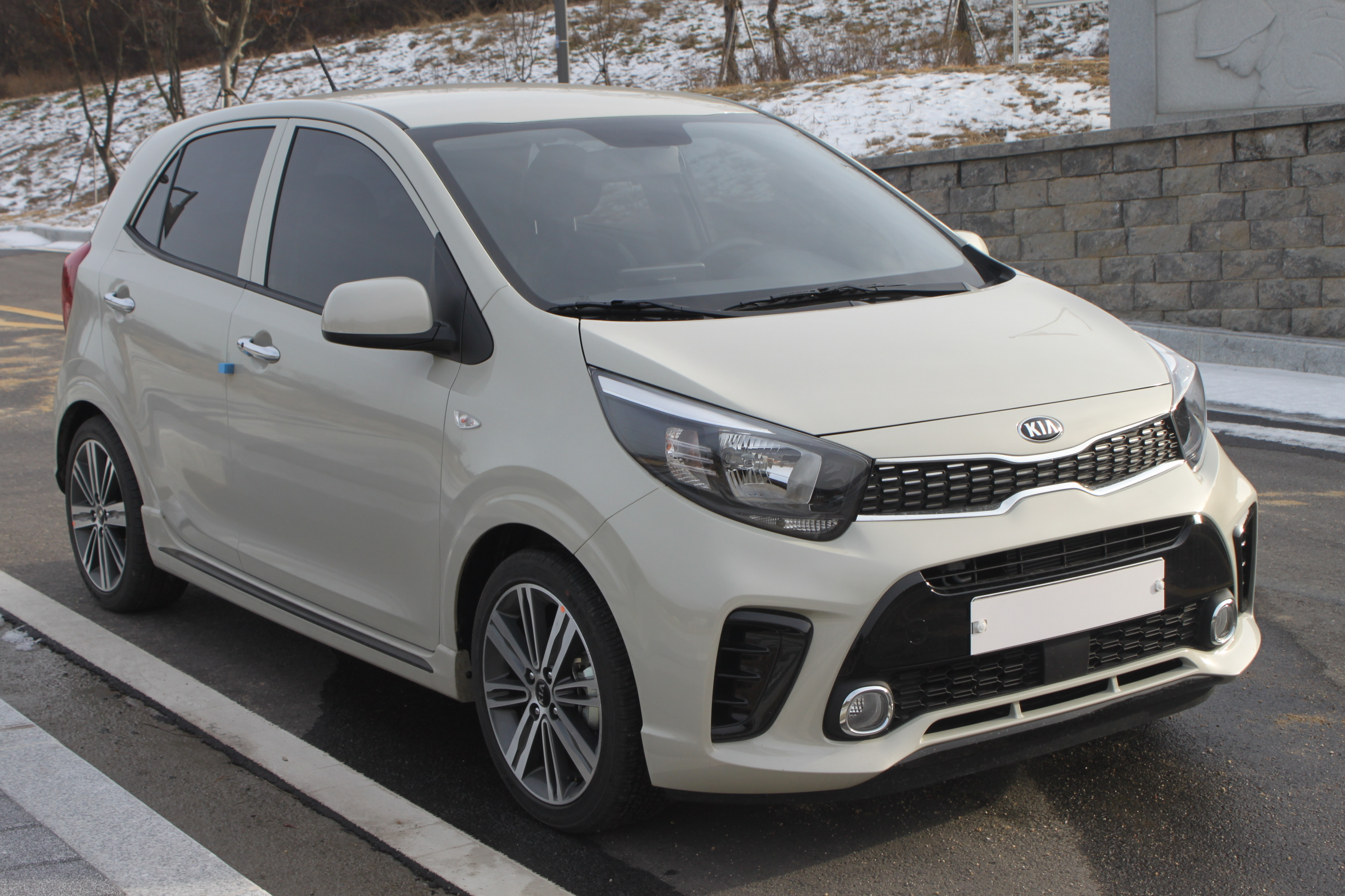 기아 모닝(3세대) 정측면